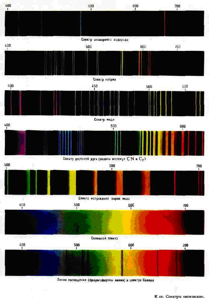 Օպտիկական սպեկտր